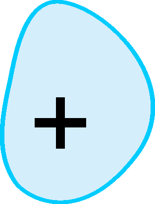 Markering av enstaka sten under vattenytan i sjökort på ett djup mindre än 2 m. Marine chart designation for a single stone (rock bolder) below the sealevel at a depth less than 2 m.